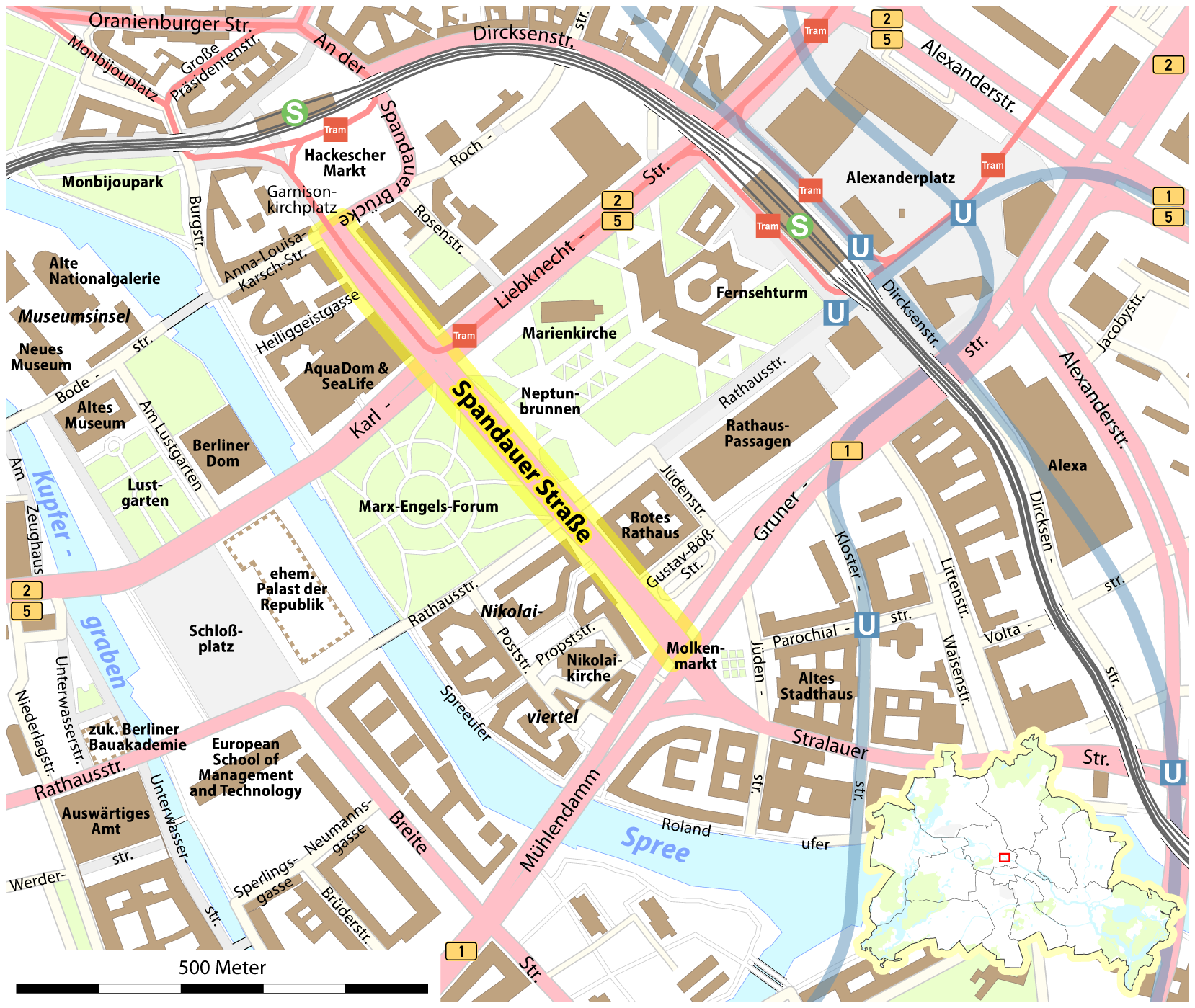 Karte der Spandauer Straße in Berlin This map may be incomplete, and may contain errors. Don't rely solely on it for navigation.